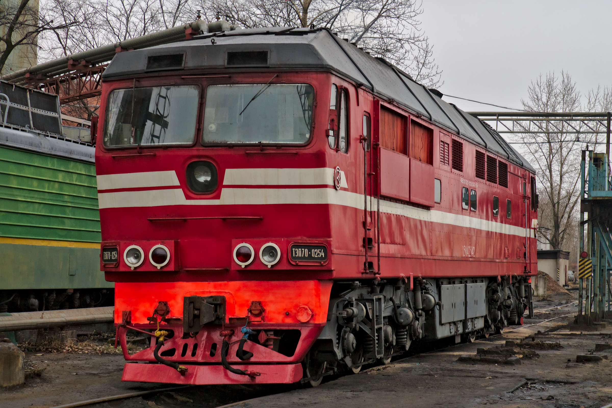 ТЭП70-0254, депо Санкт-Петербург-Сортировочный-Витебский. см. фото 638588 в альбоме автора